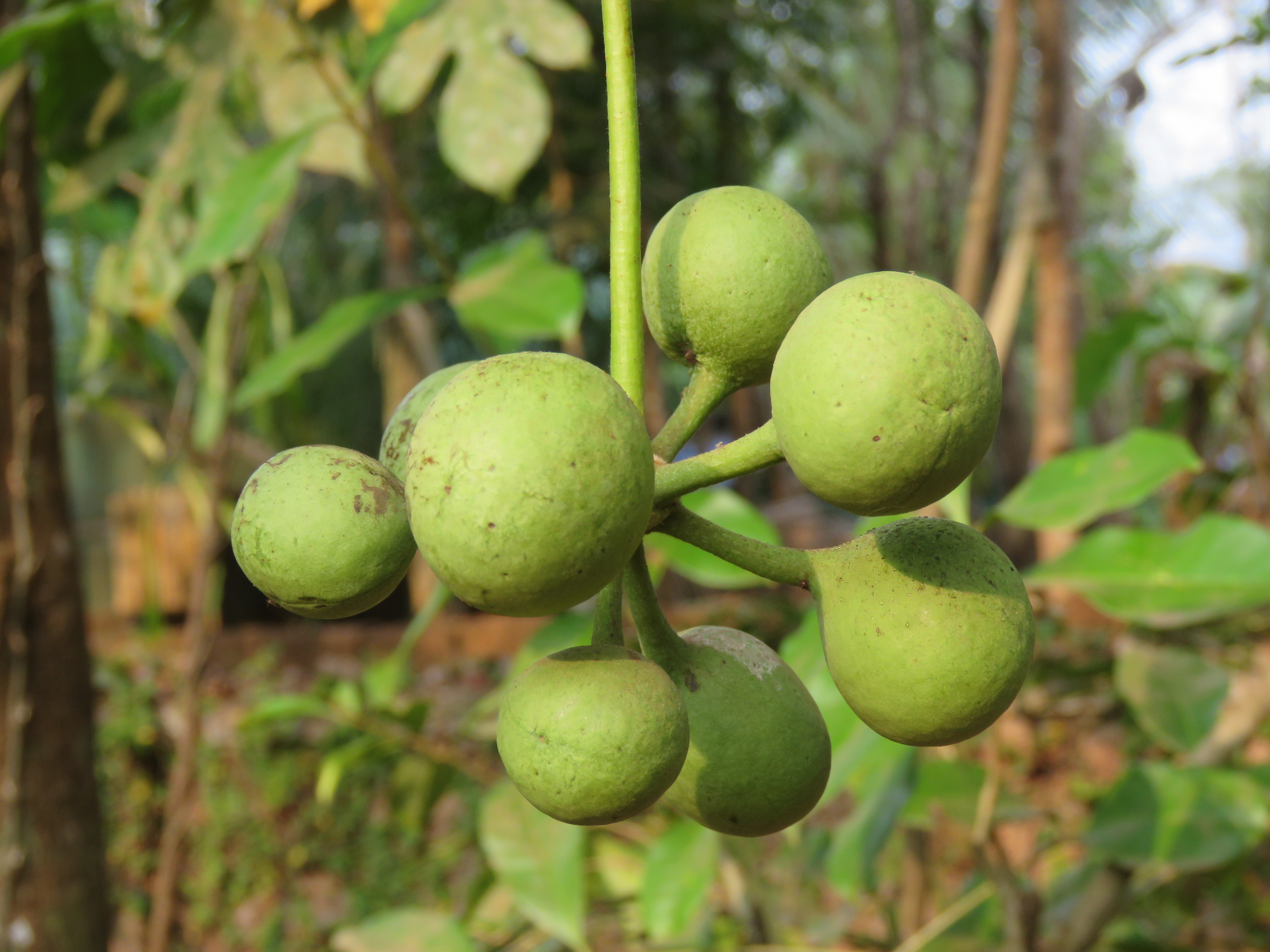 Photos by Vinayaraj